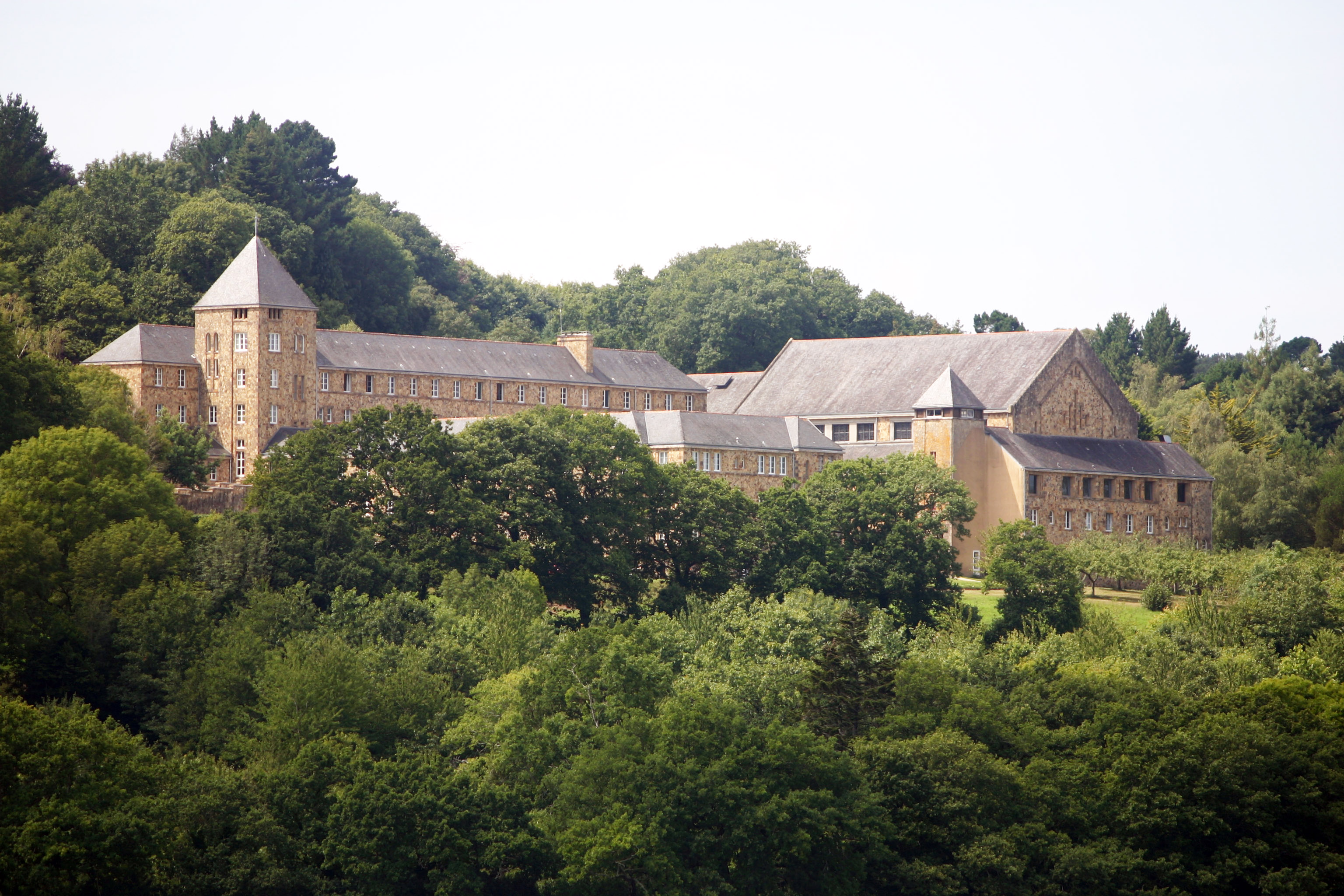 Abbaye de Guénolé à Landévennec sur les bords de l'Aulne